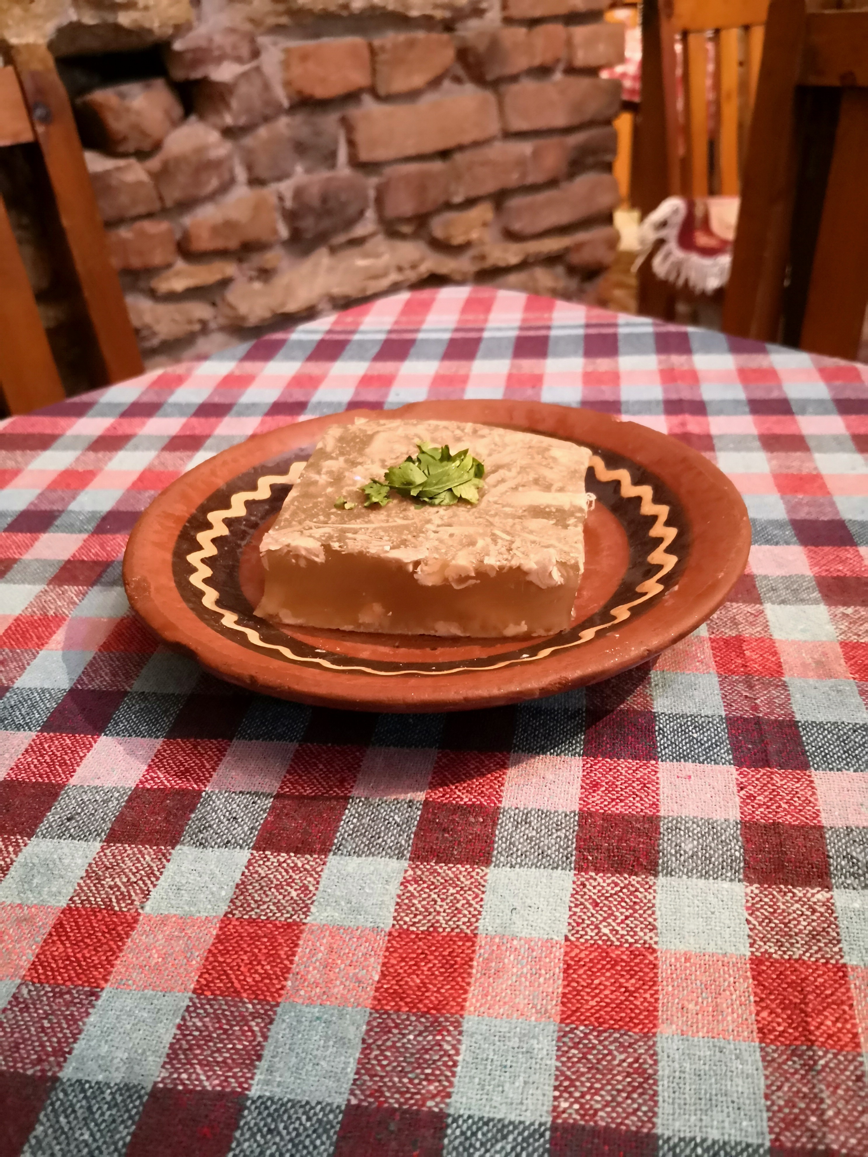 Пивтија